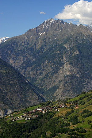 Ergisch